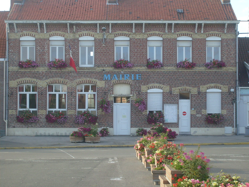 Mairie de Spycker